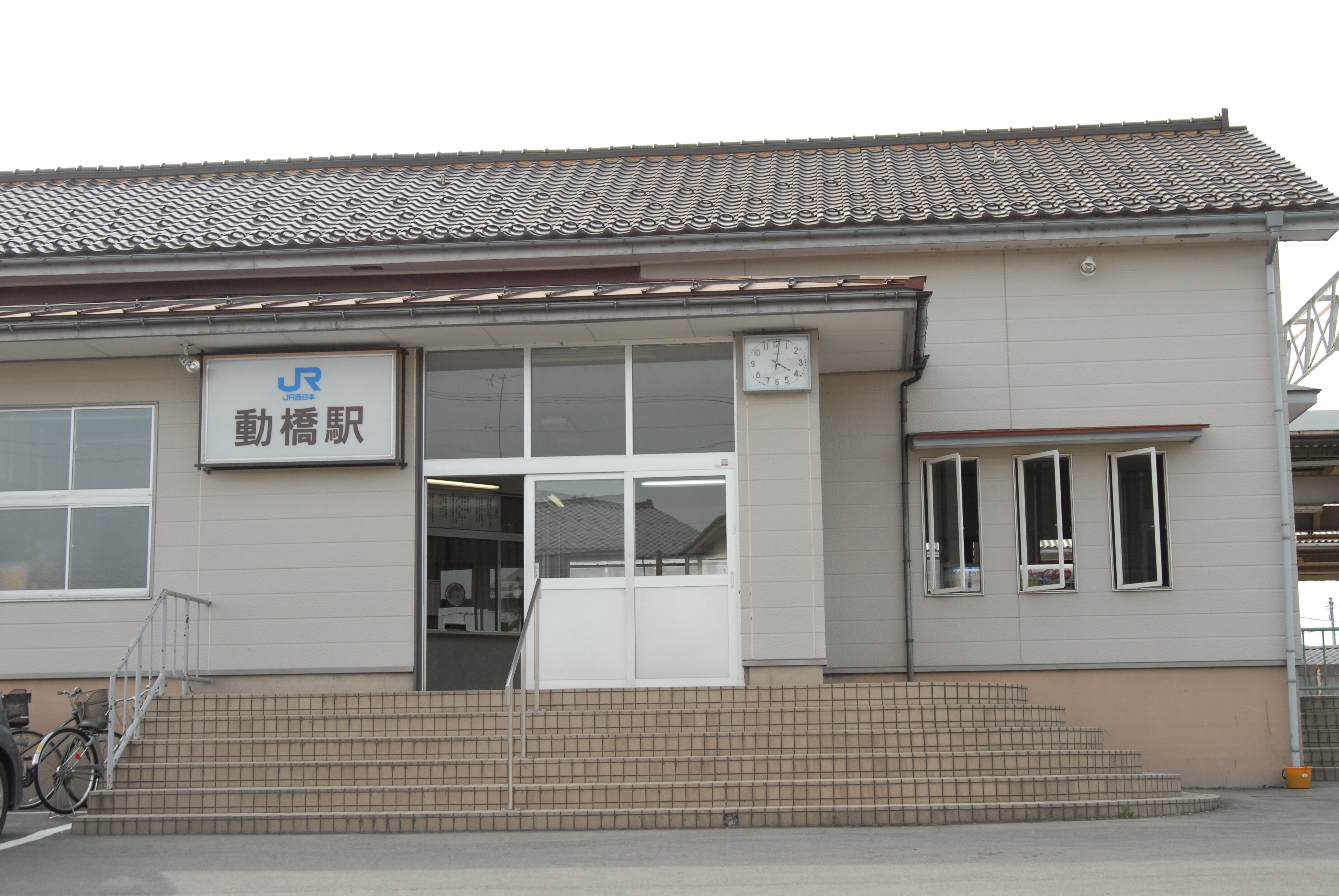 動橋駅駅舎